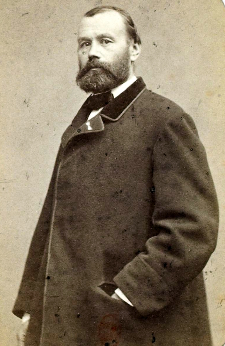 [Recueil. Personnalités des arts et des lettres] : vue 34 - F. 14v. Firmin Bocourt (Carjat phot.)